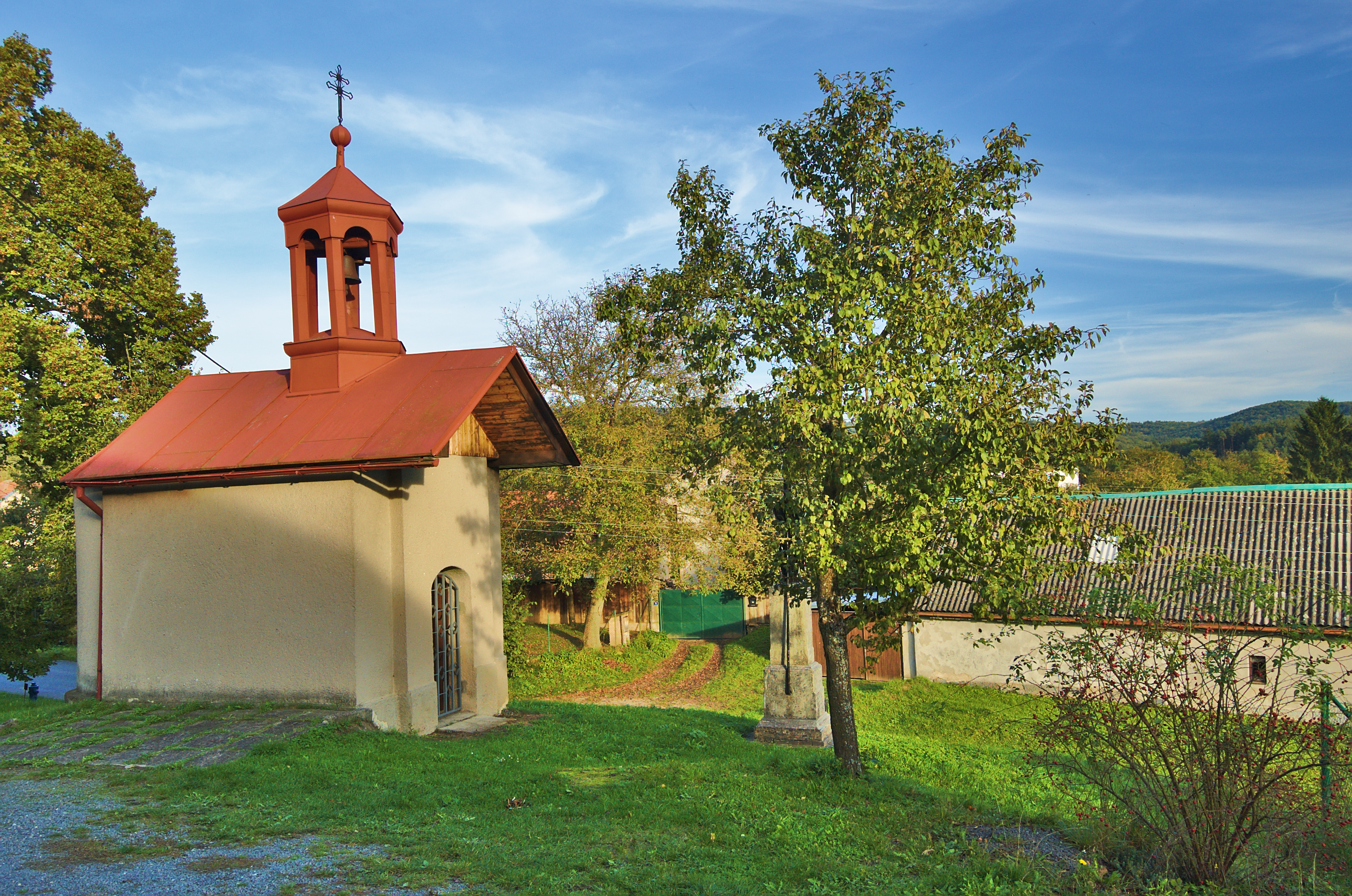 Kaple, Březinky, okres Svitavy